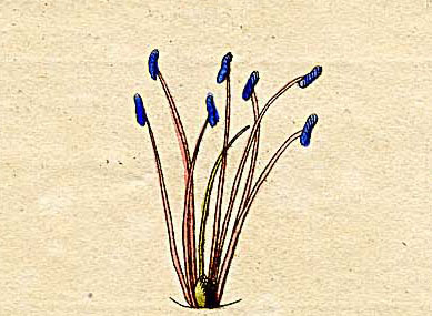 Ausschnitt (Klasse VII) aus Ehrets Tafel "Methodus Plantarum Sexualis"